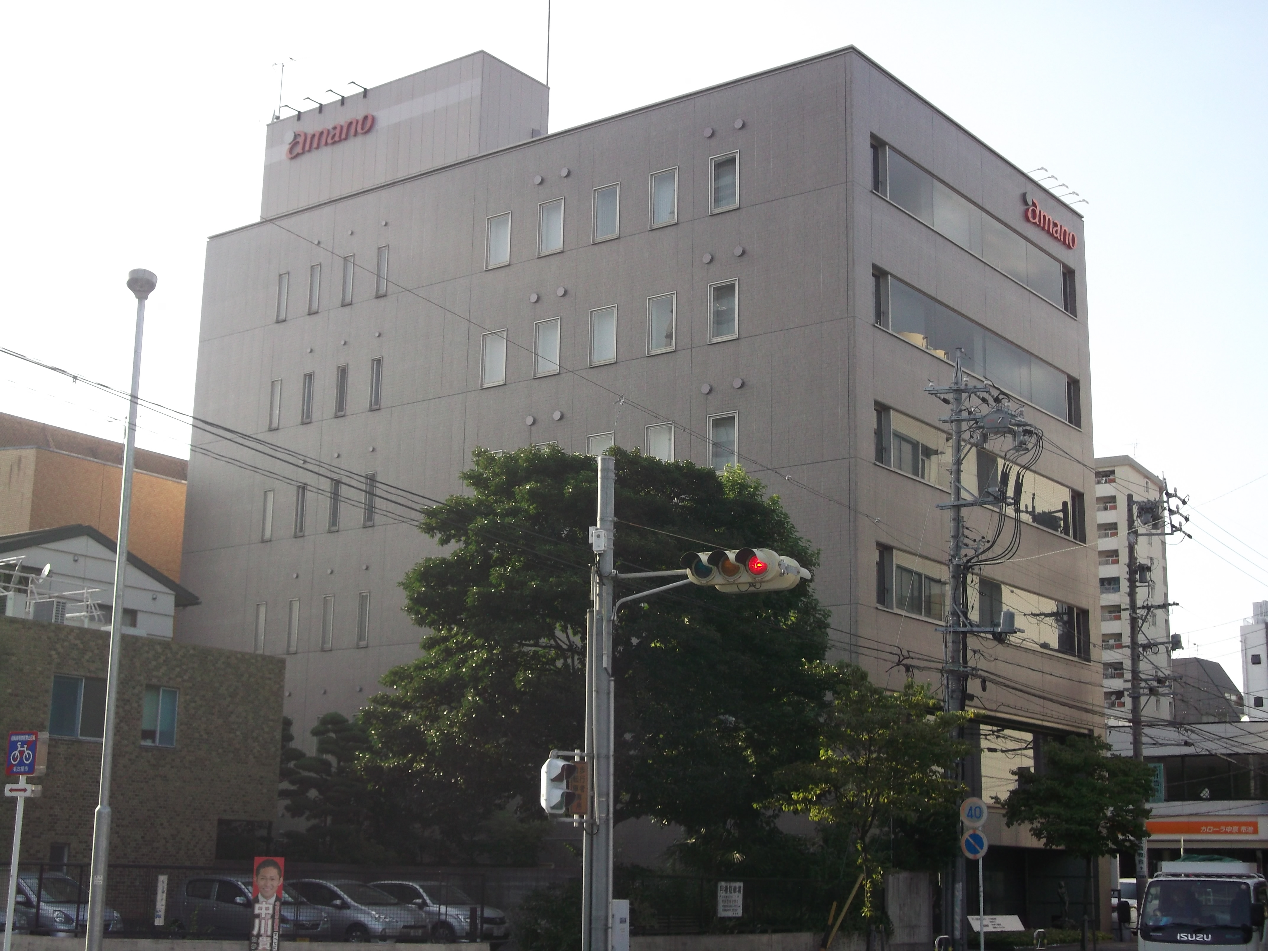 名古屋市東区のアマノ本社を南側公道東側より撮影